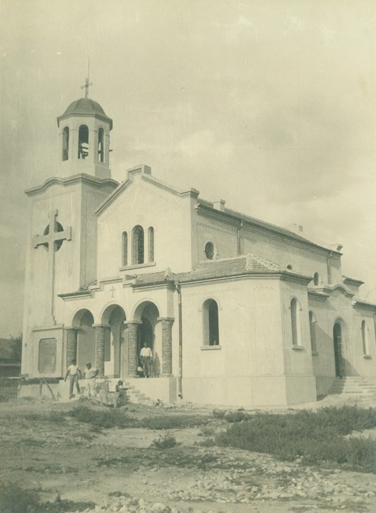 Новопостроената църква в Дългопол. Ръководител на строежа е майсторът Коста Миланов Петров (1904-1989).